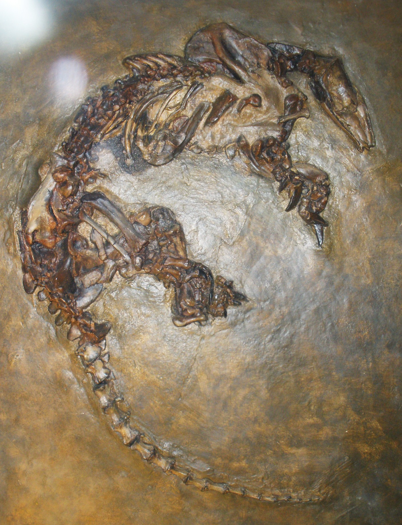 Fossil of Eurotamandua, an extinct mammal- Took the photo at Senckenberg Museum of Frankfurt